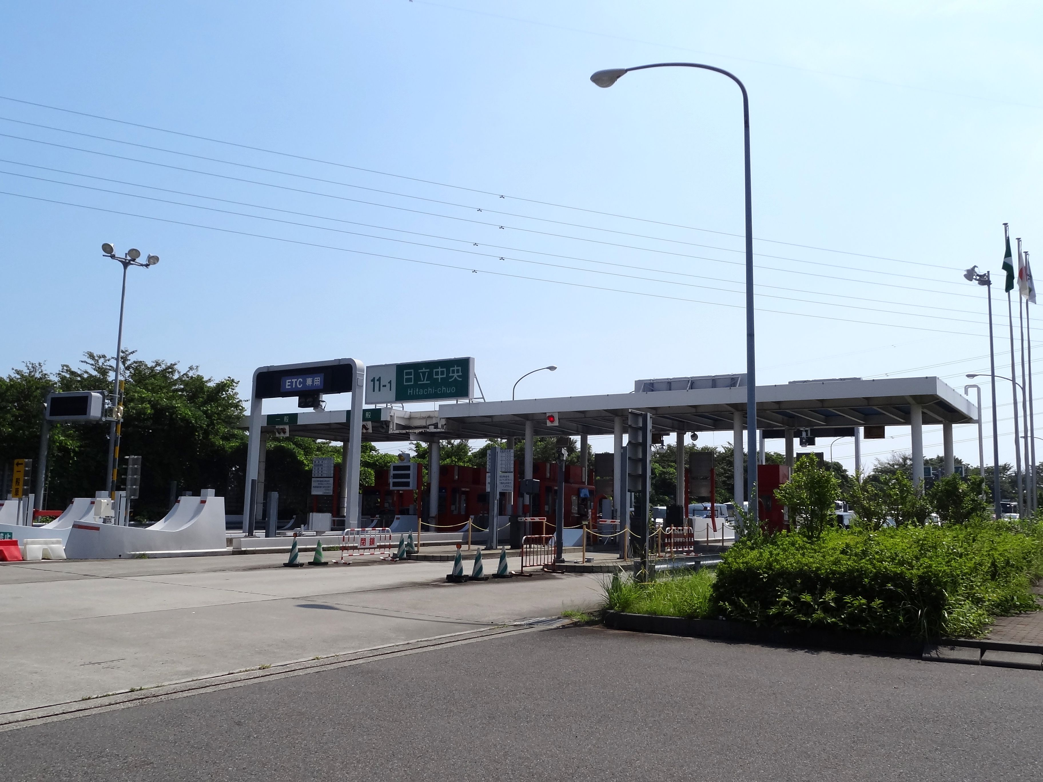 常磐自動車道 日立中央インターチェンジ（料金所付近）